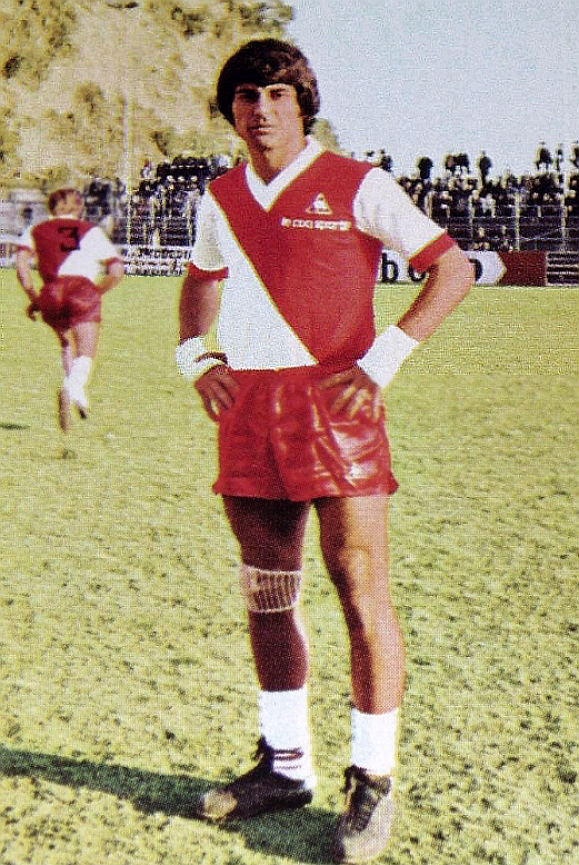 Delio Onnis en 1973 (AS Monaco), 'Ageducatifs 1973 - 1974', Panini figurina n°110.